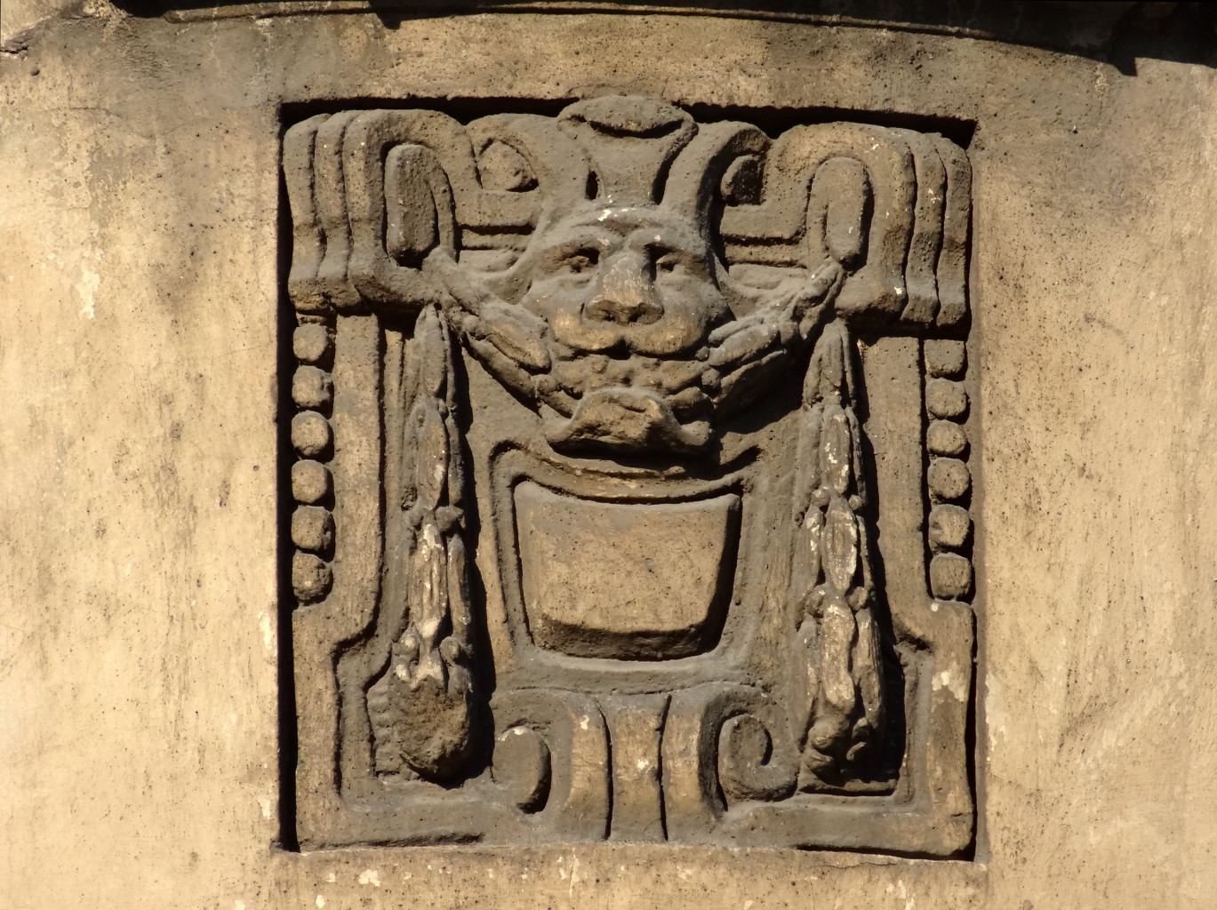 Kamienica przy ul. Dworcowej 49 w Bydgoszczy